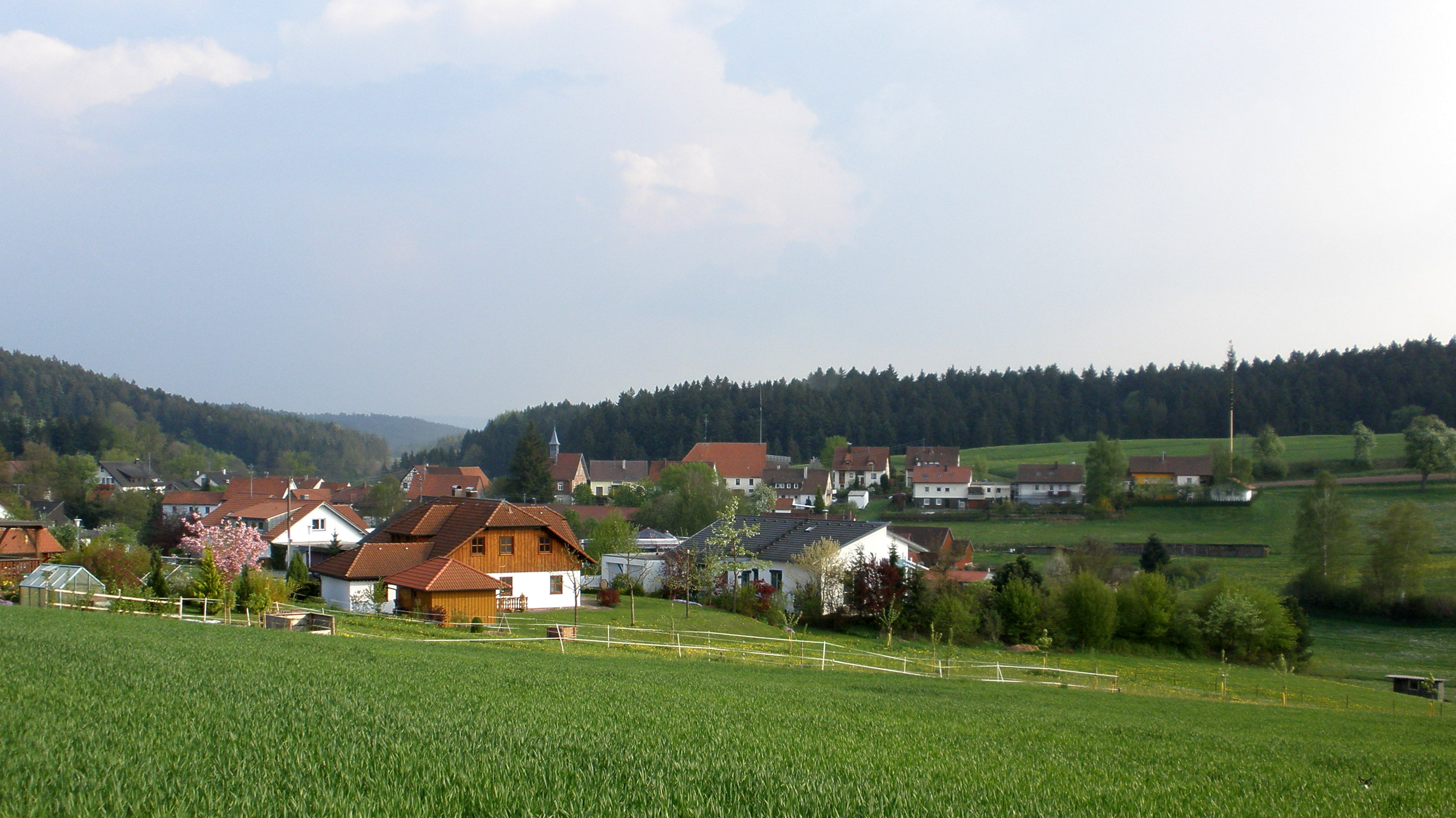 Blick auf Birkenlohe, einen Teilort von Ruppertshofen (Ostalbkreis).